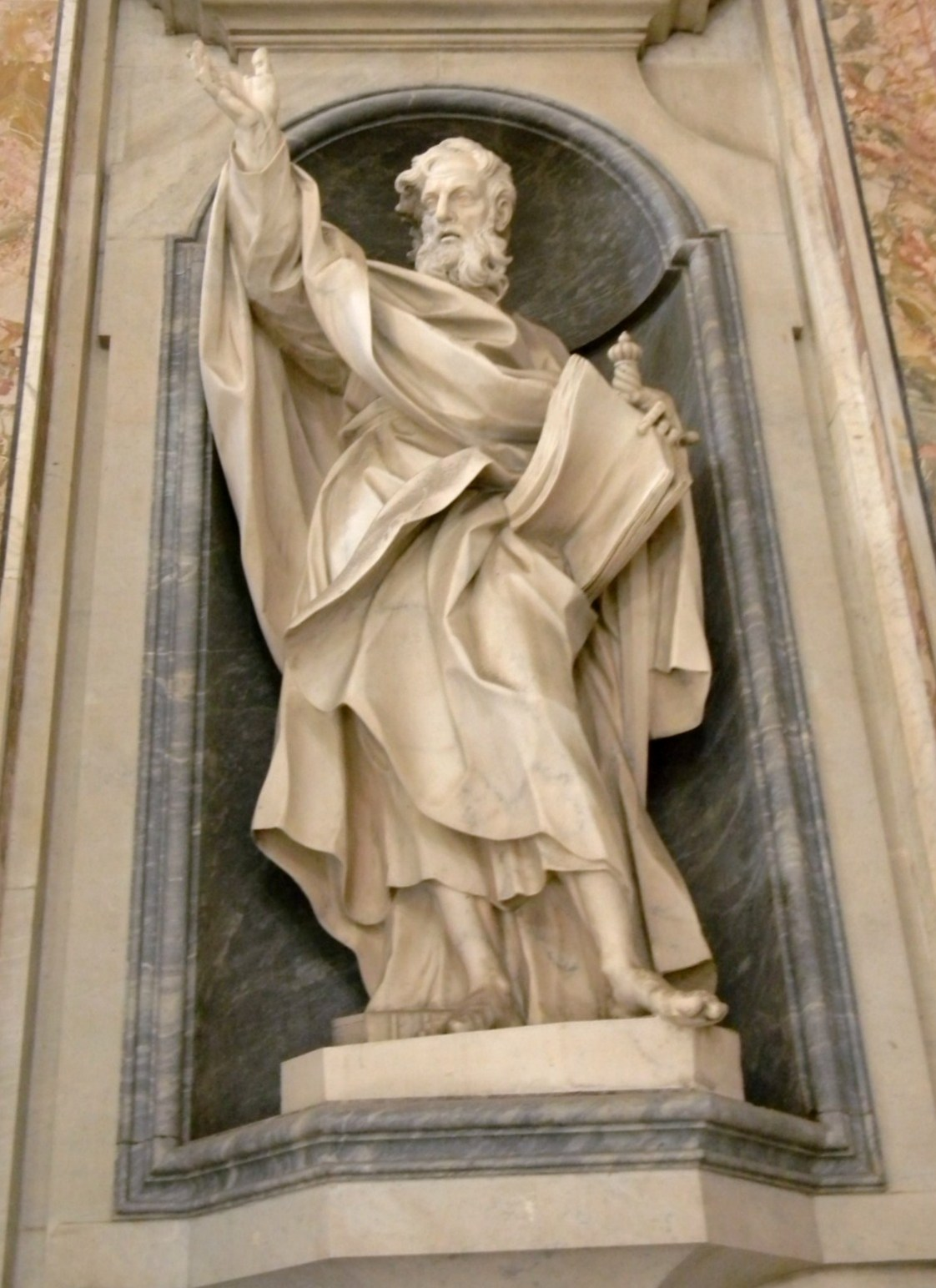 Napoli. Chiesa dei S.S. Severino e Sossio. san Paolo.